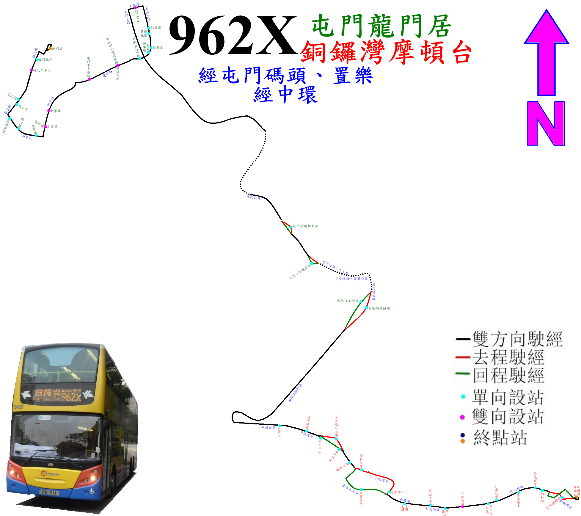 中文（香港）: 過海隧巴962X線走線圖